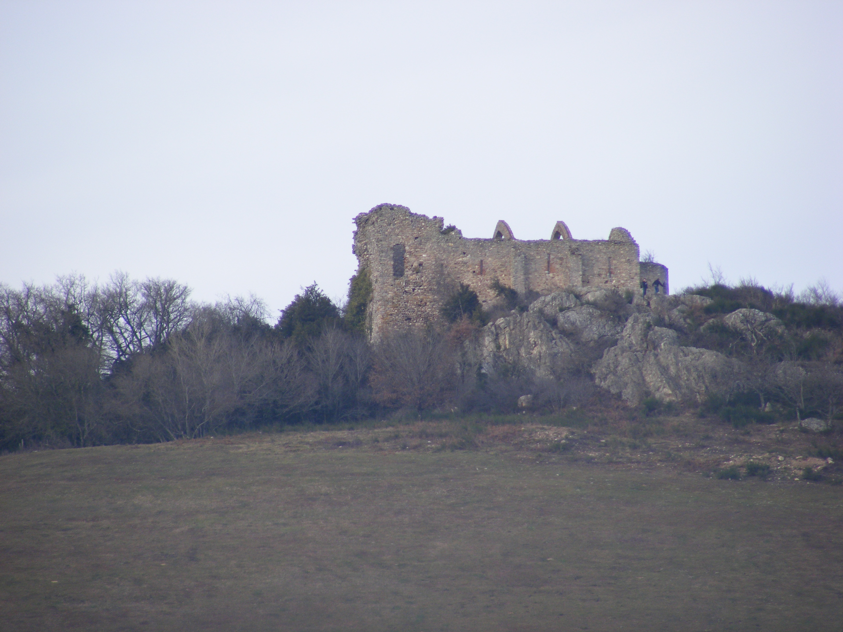 ABBAYE DU PUY SAINT GEORGES